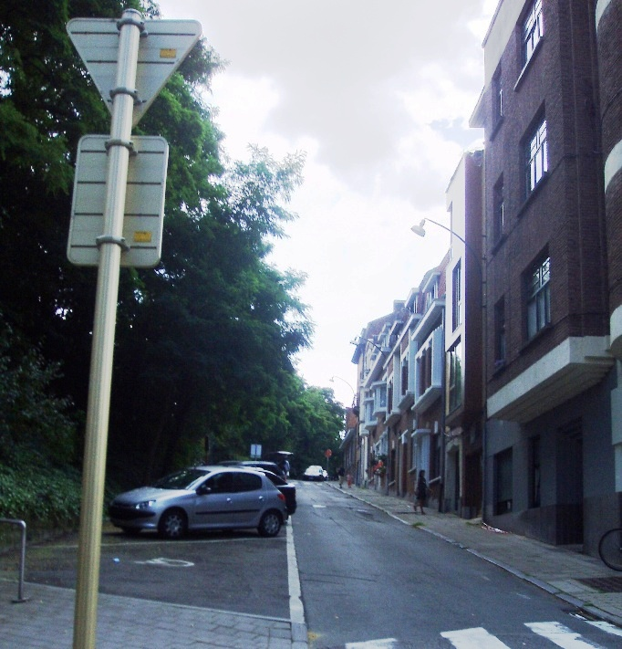 Rue Robert Willame Auderghem Belgium